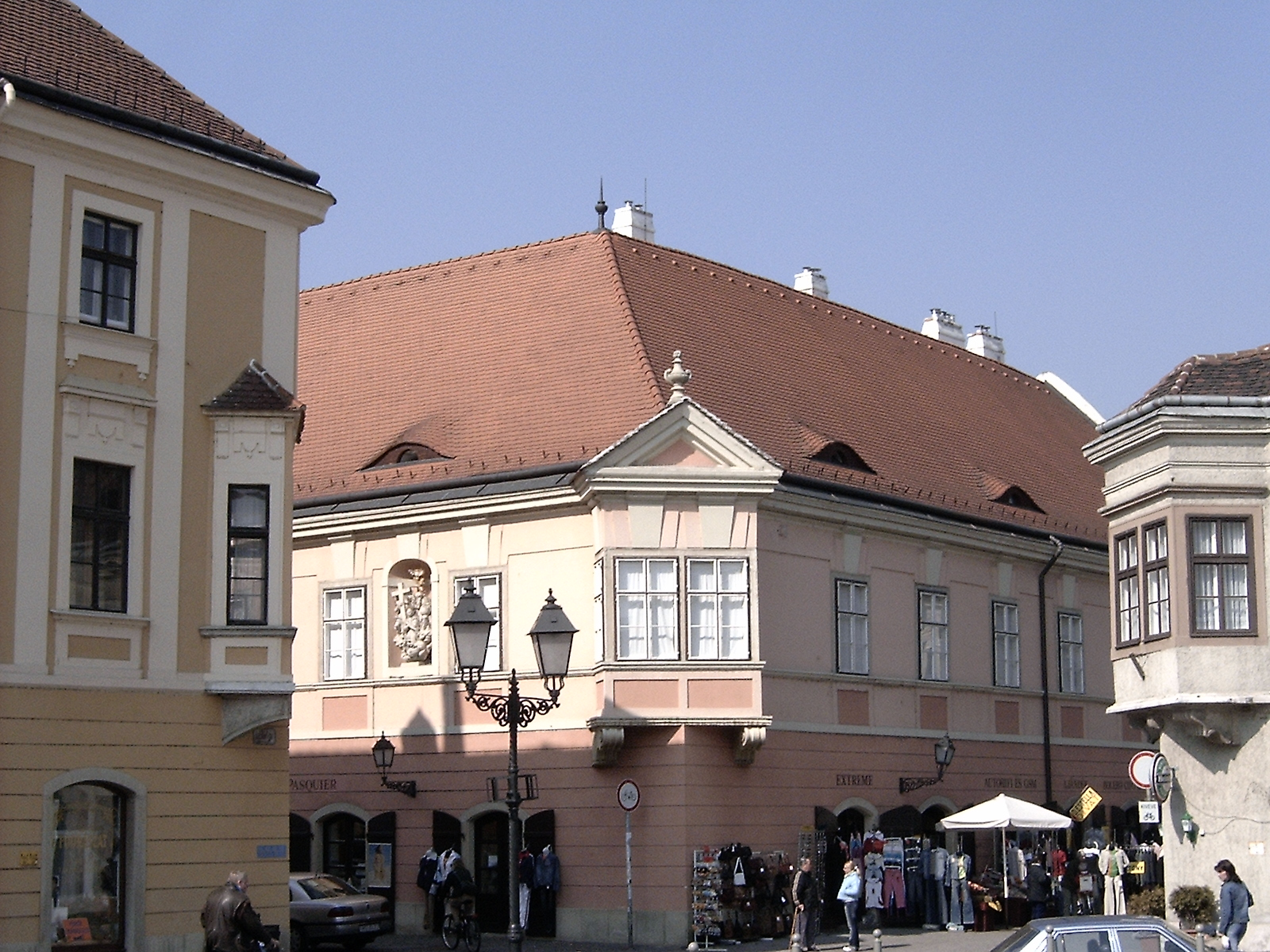 A Széchenyi tér északnyugati sarka, barokk műemlék Esterházy-palota. 1770 - Győr, Király utca 17., Széchenyi tér)